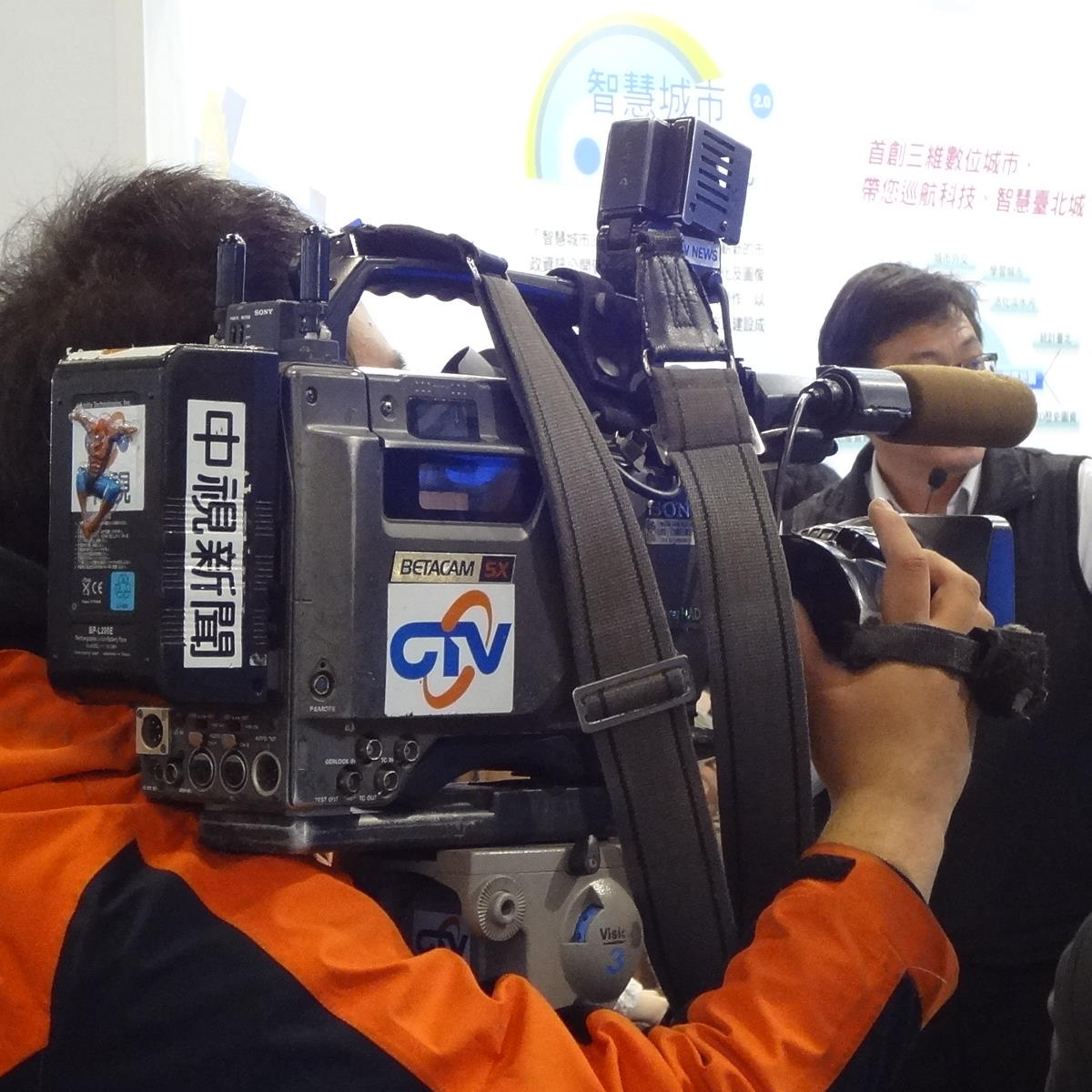 2013年台北資訊月，中視新聞攝影記者使用的Sony Betacam SX攝影機。